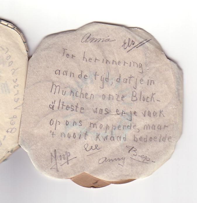 Souvenir van mevrouw van Ommen, lid van het Agfacommando van Dachau, pagina 4